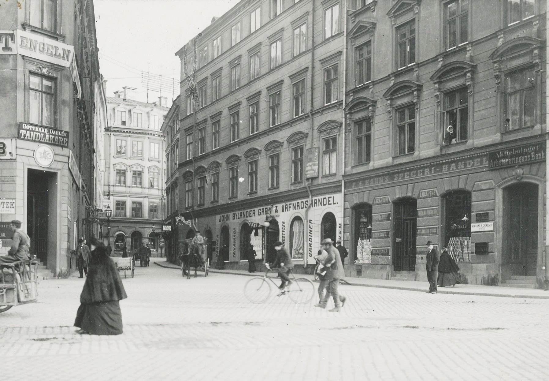 Triewaldsgränd mot Järntorget, apoteket Engelen till vänster och Mårten Triewalds hus (nr 3) till höger